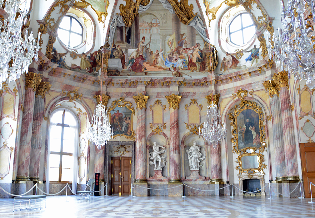 Residenz Würzburg, Kaisersaal